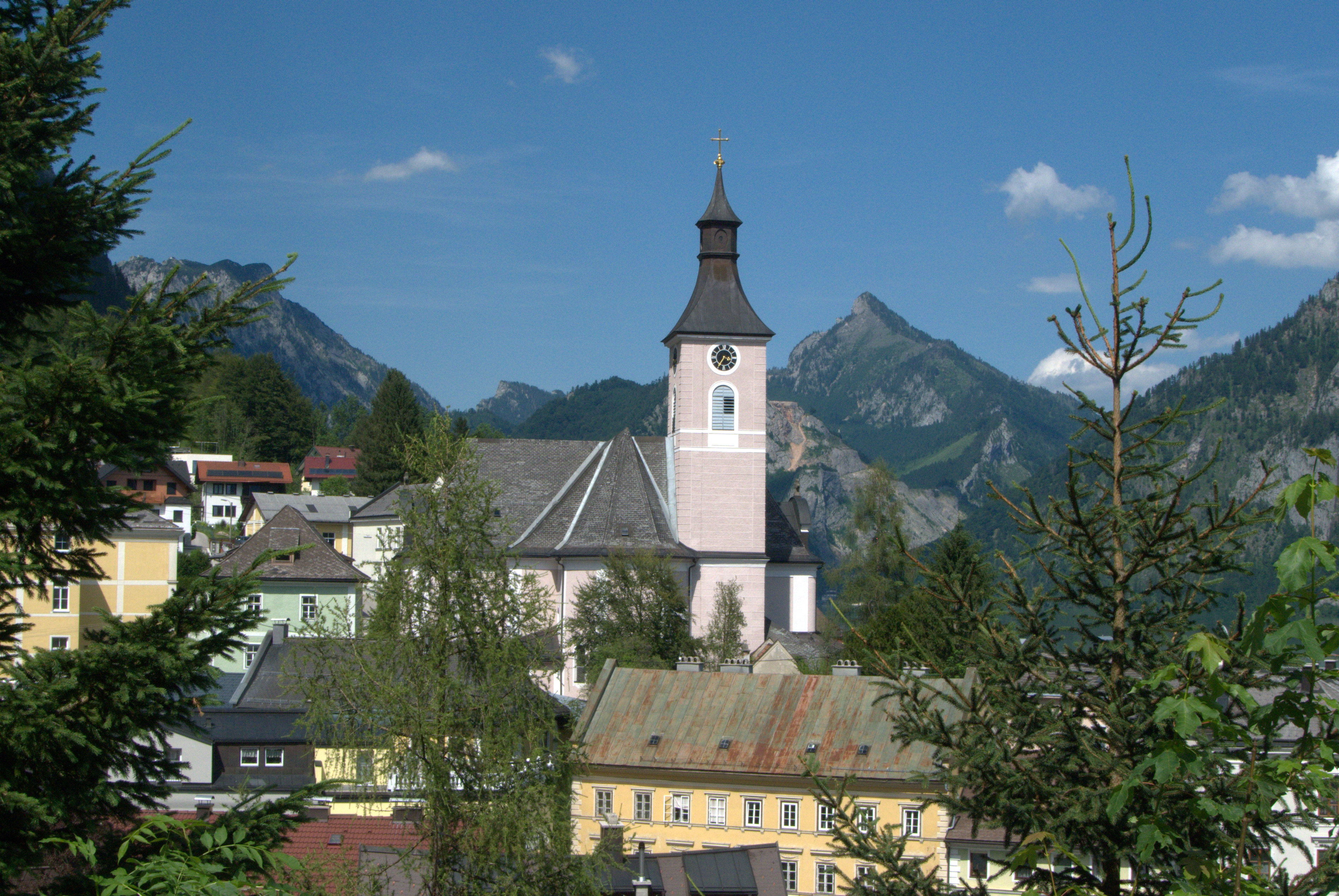 Kath. Pfarrkirche hl. Josef